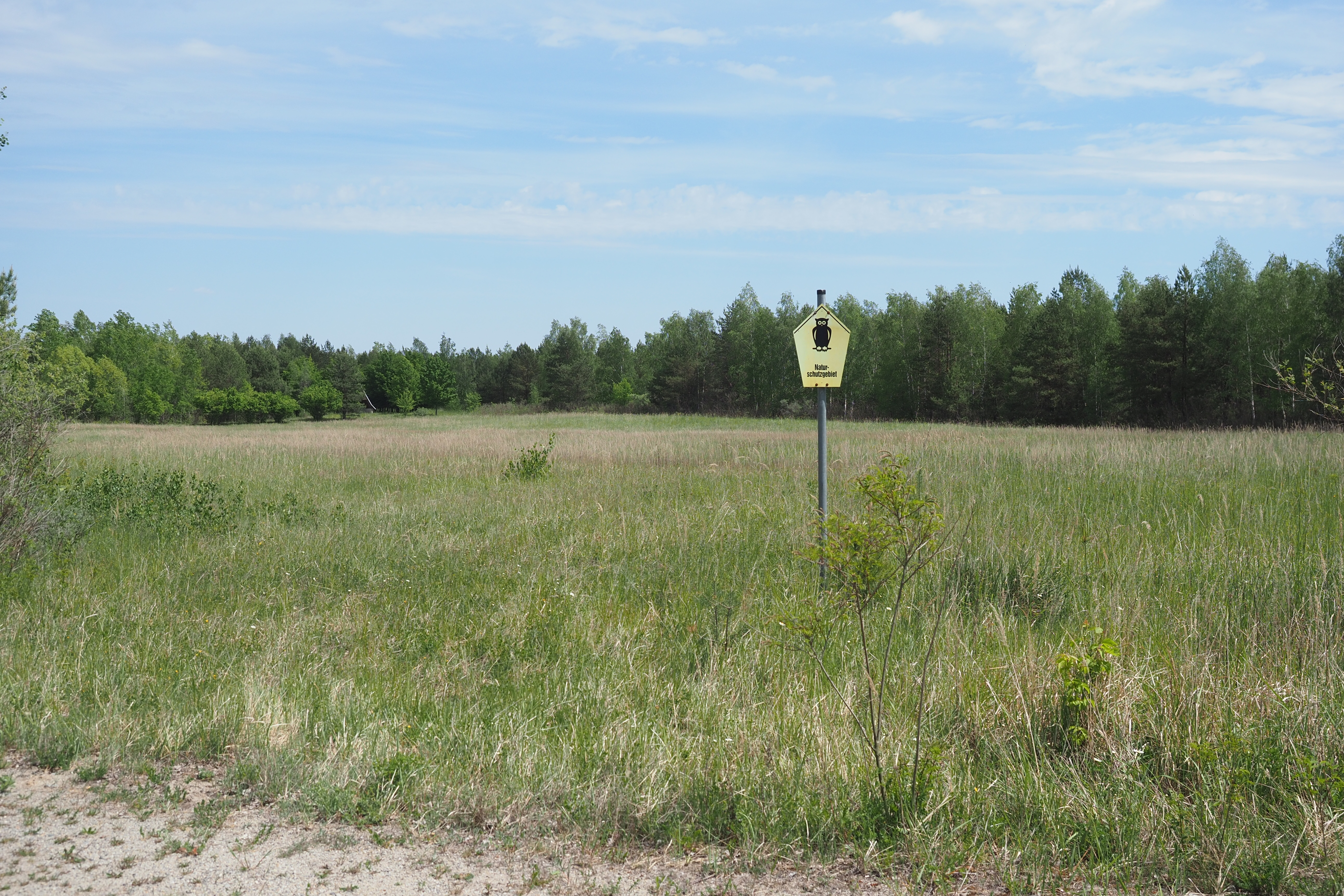 Naturschutzgebiet Innenkippe Nochten in Sachsen, eine geschütze Heidefläche